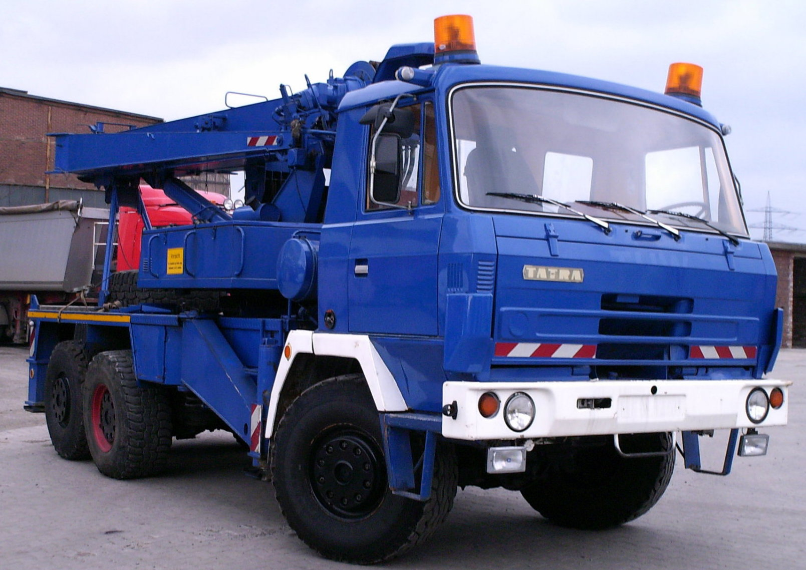 Tatra 815 Dreiachser mit Kranaufbau